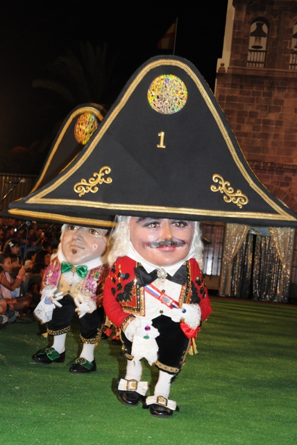 Danza de Enanos 2015. Foto: PMBV